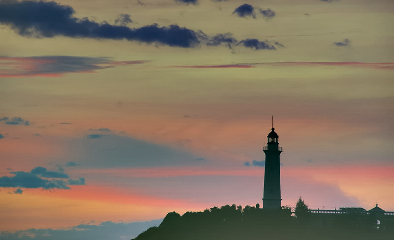 HD đại lãnh